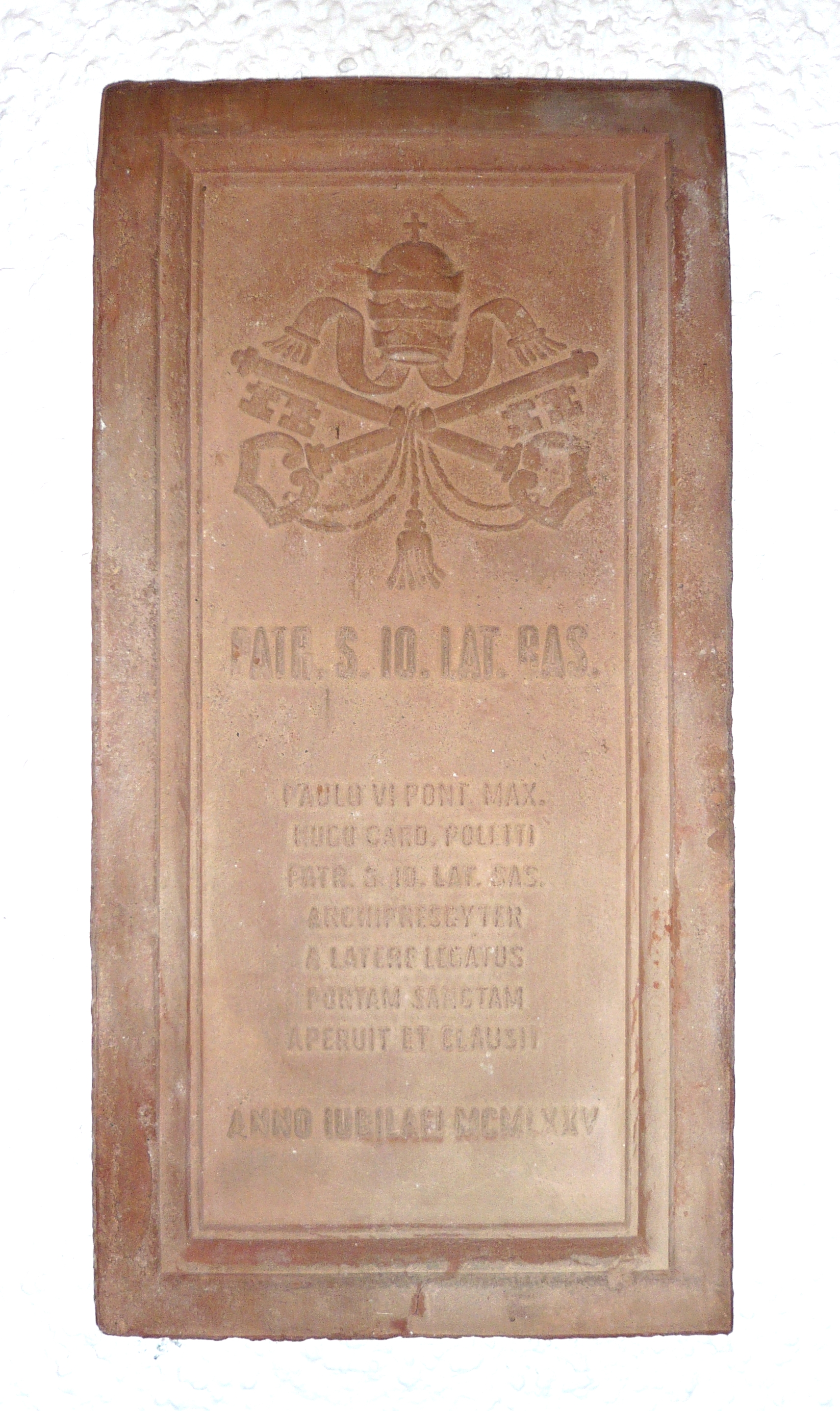 Kirche in Berlin-Marzahn: Stein von der Heiligen Pforte des Petersdoms zu Rom